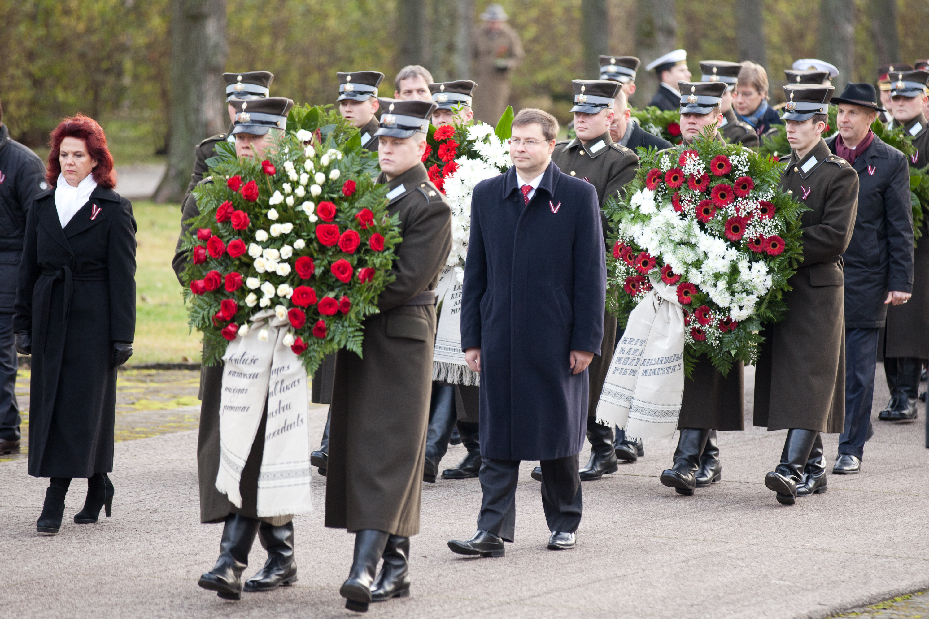 Foto: Toms Norde, Valsts kanceleja